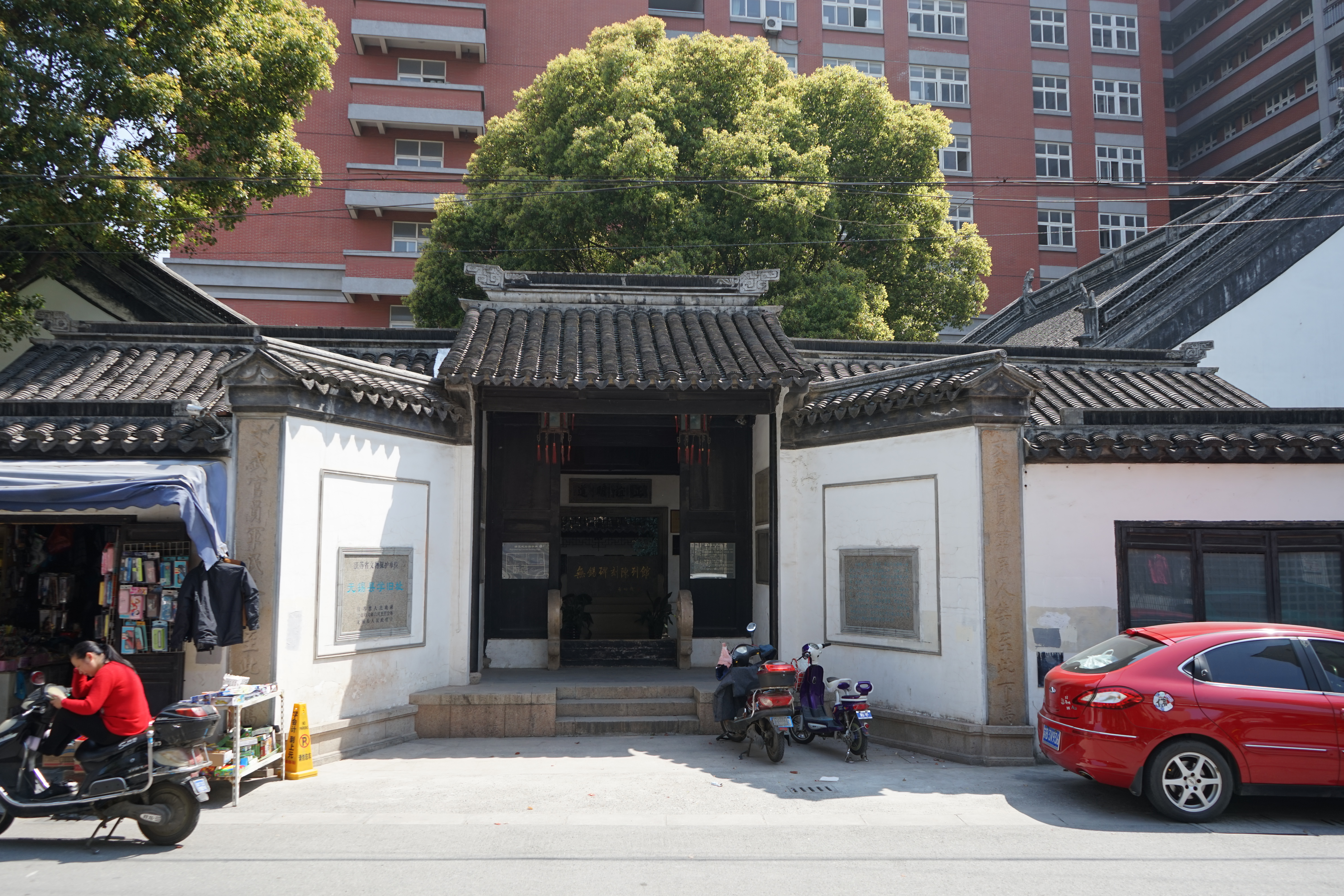 中文（中国大陆）: 无锡县学旧址。